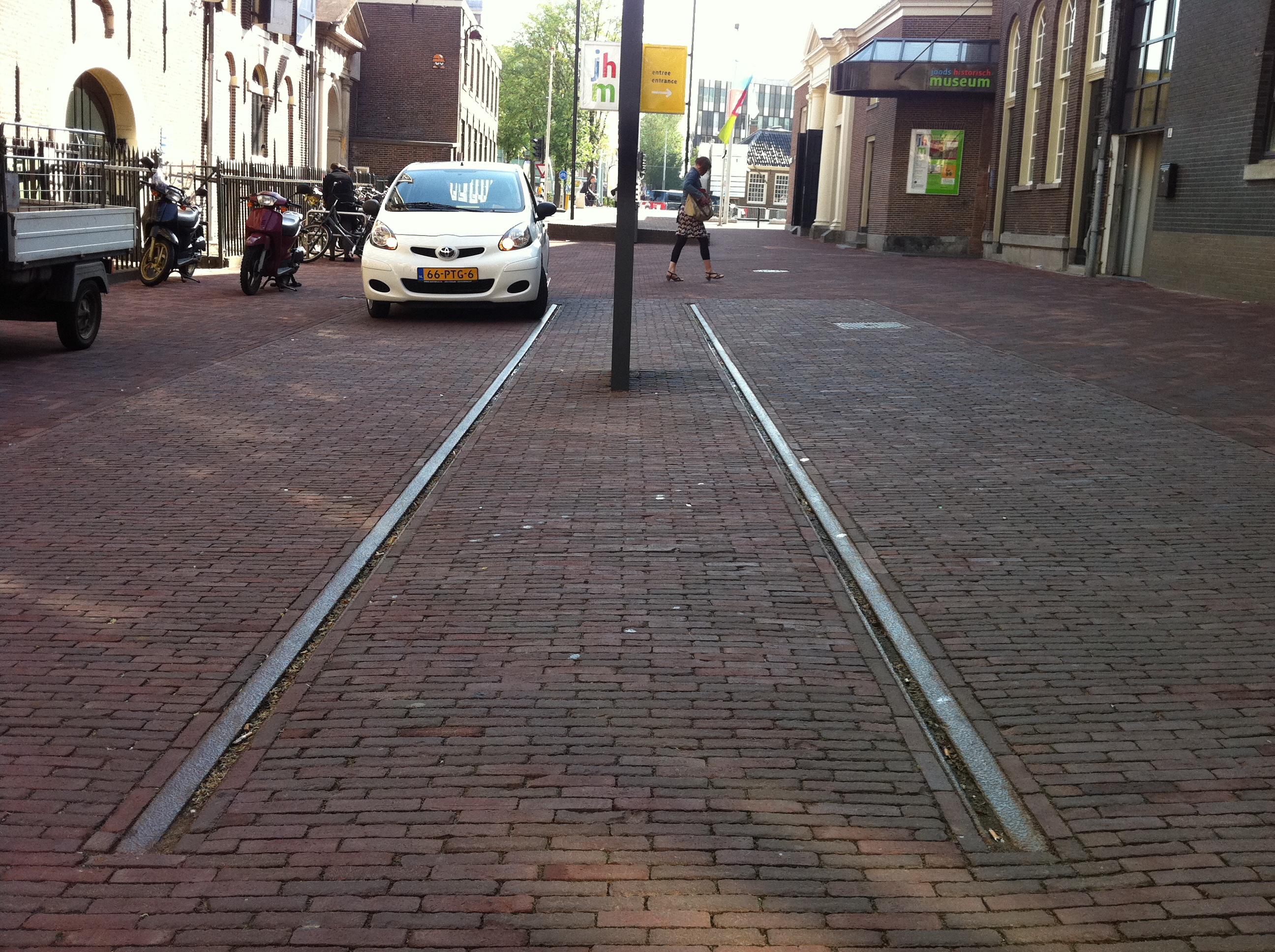 Amstelstraat